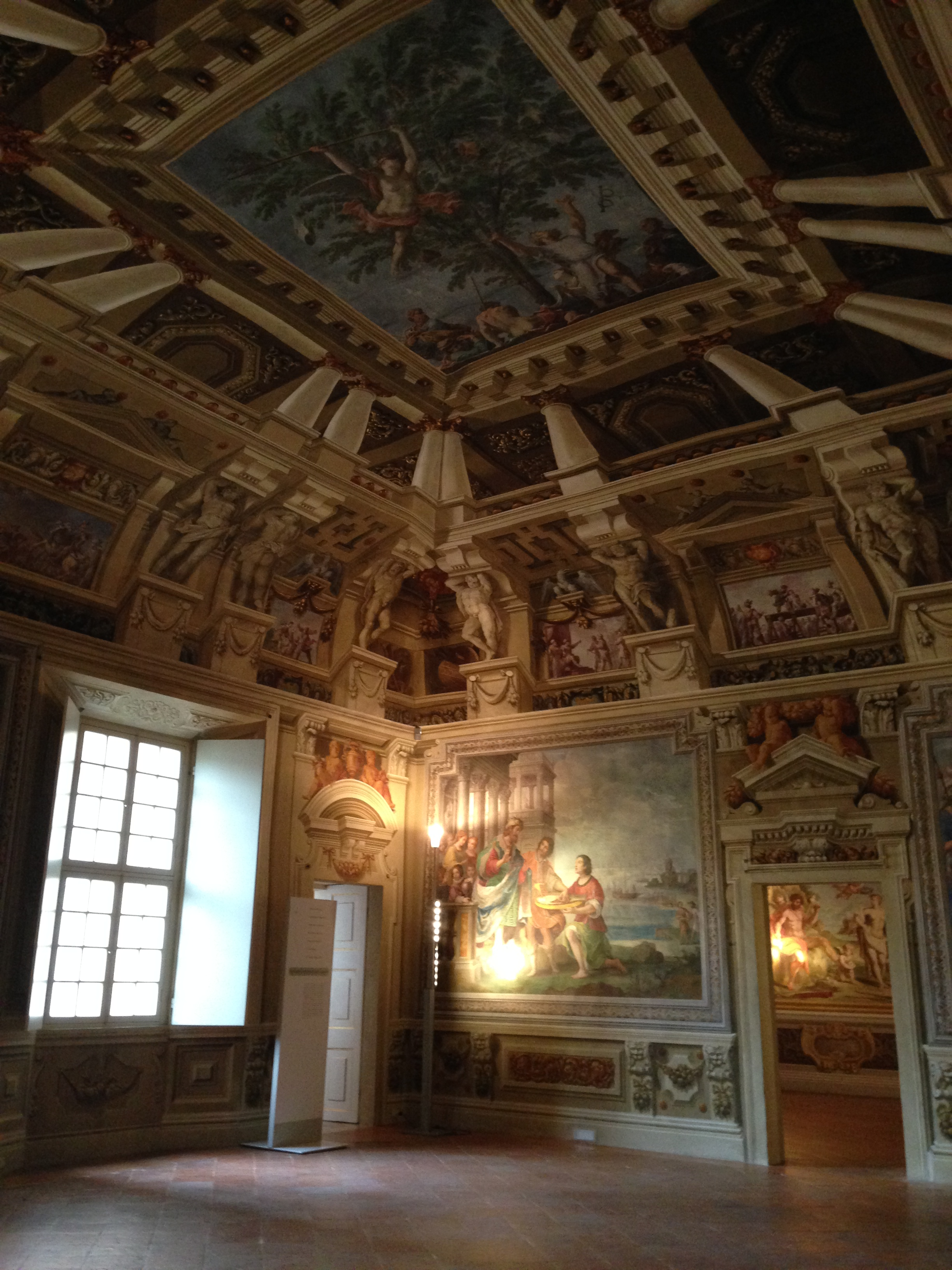 Palazzo e Parco Ducale This is a photo of a monument which is part of cultural heritage of Italy.